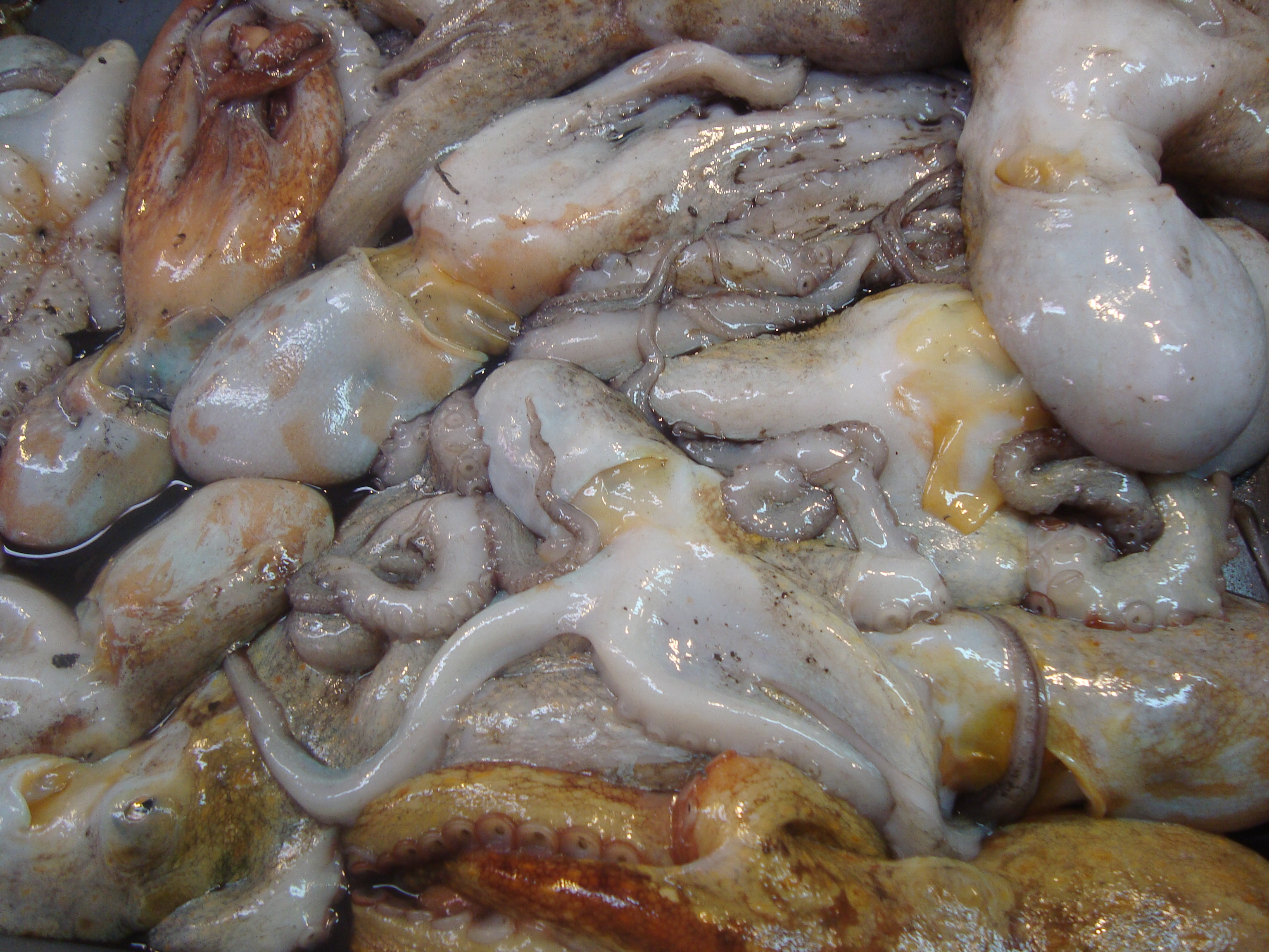 Pulpos de lonja. Origen: Puerto pesquero de Benicarló